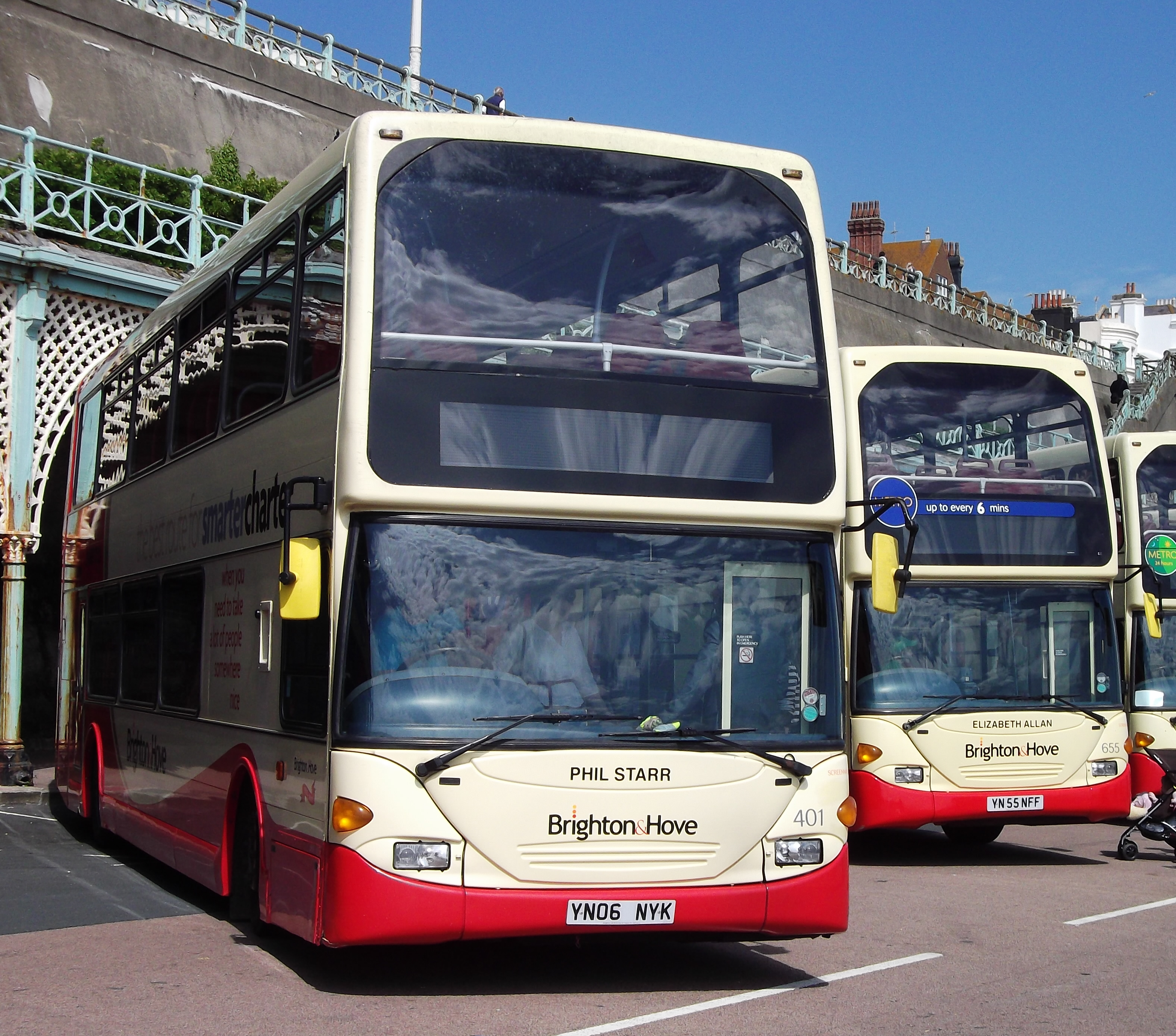 And Friends